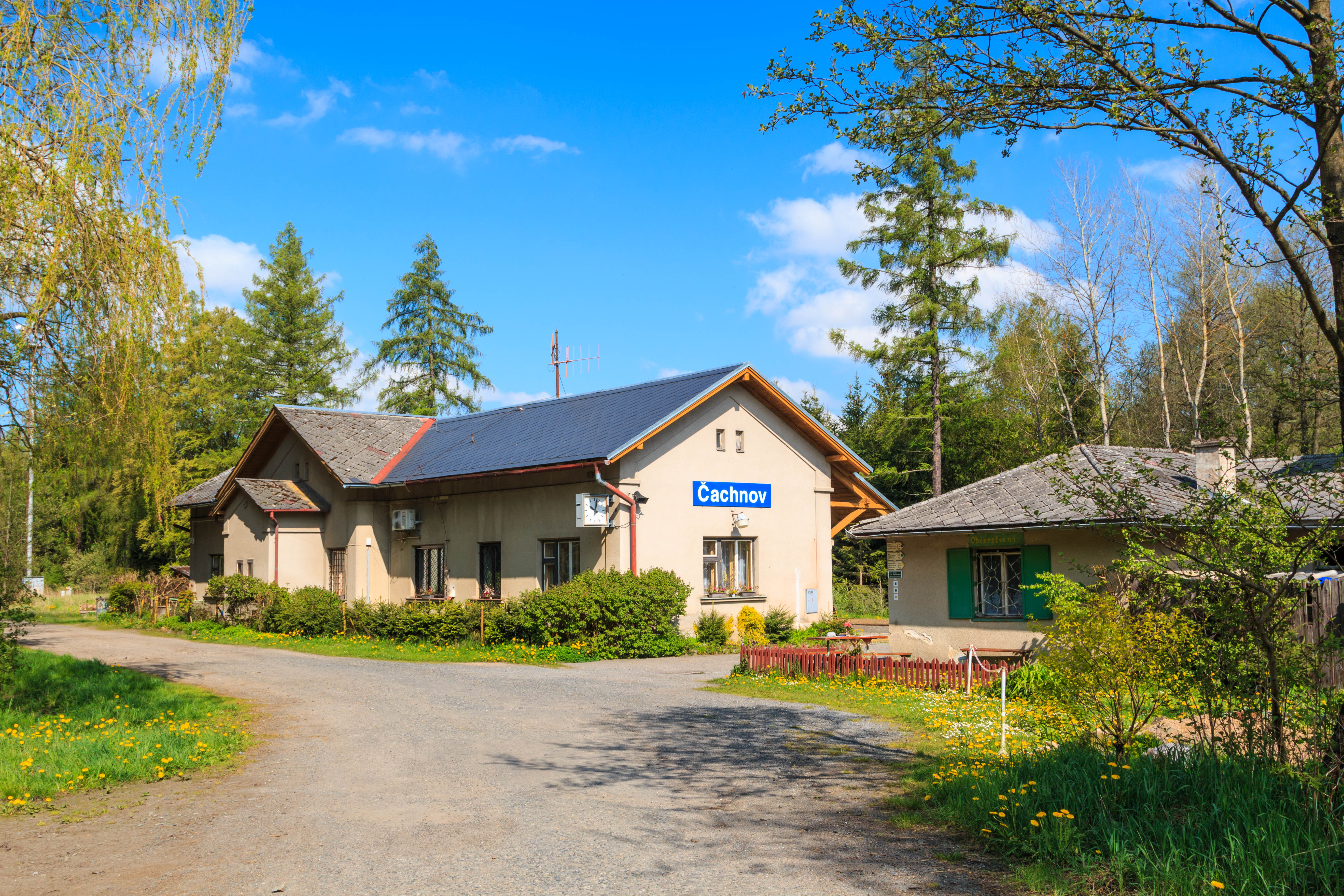 Čachnov stanice